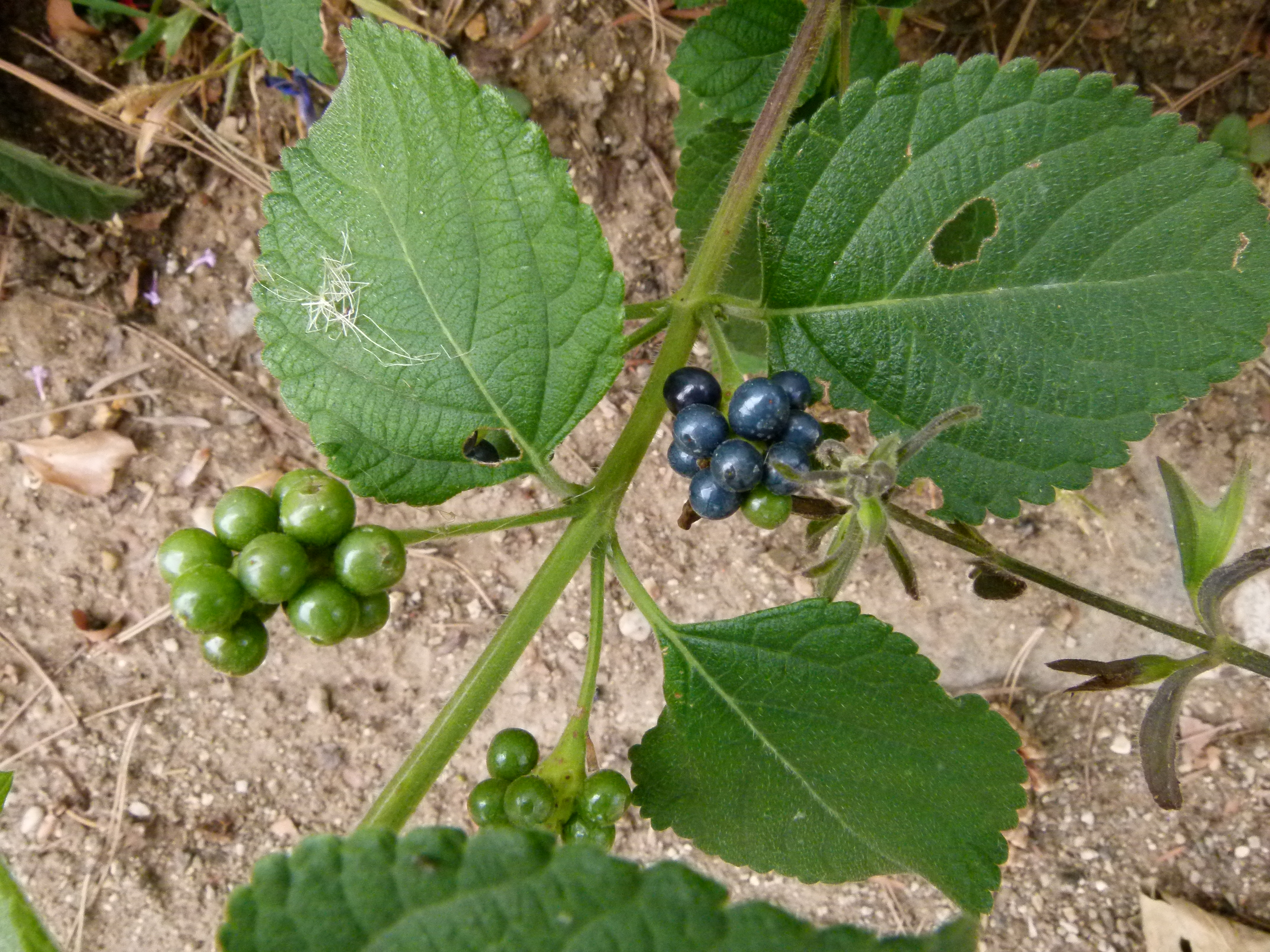 Lantana camara - Jardin Agronomique Tropical